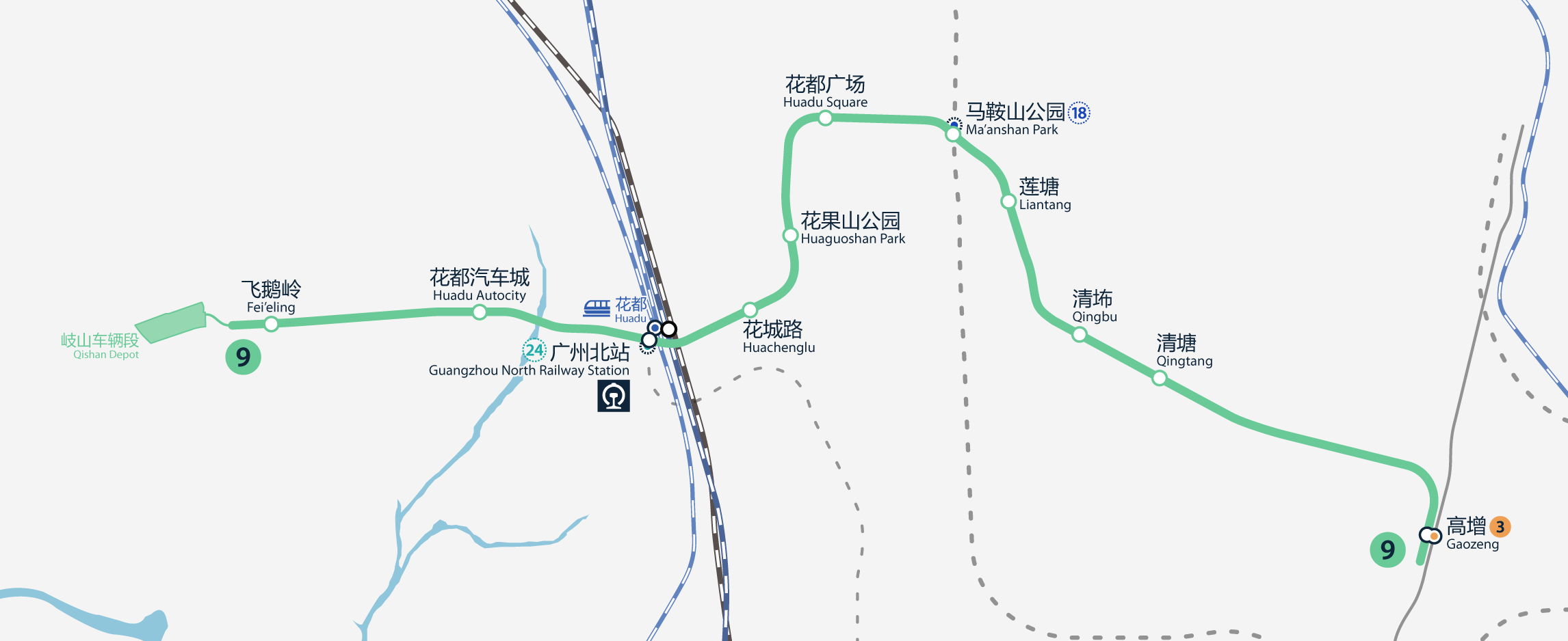 廣州地鐵9號線路線圖（在建），按真實走向比例繪畫